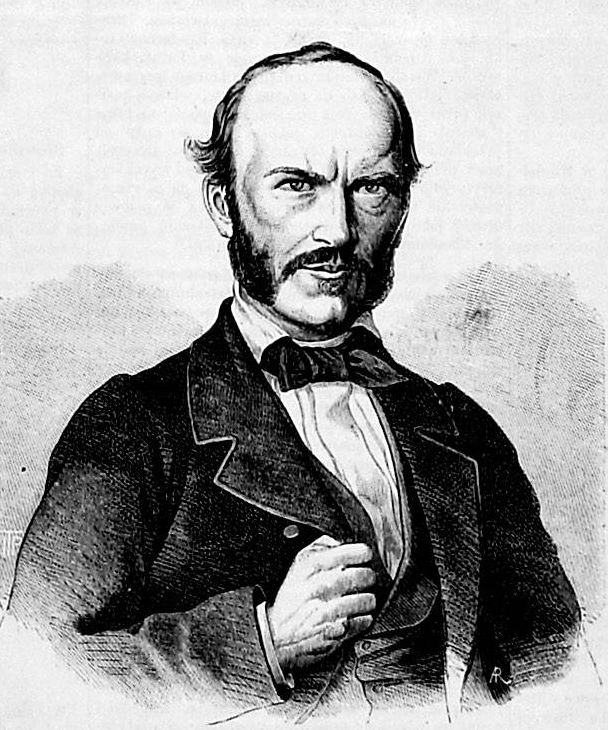 Antoni Małecki 1821-1913